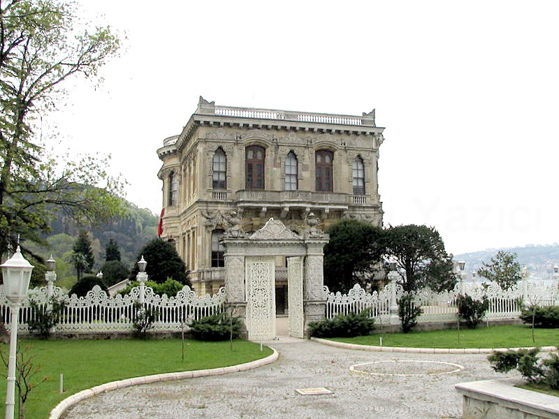 Küçüksu Kasrı in İstanbul